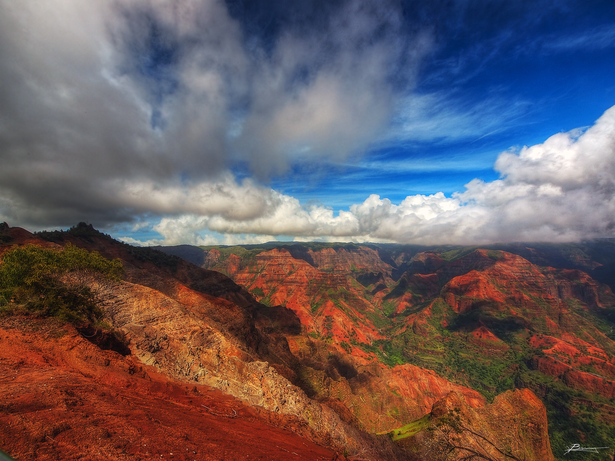 kauai